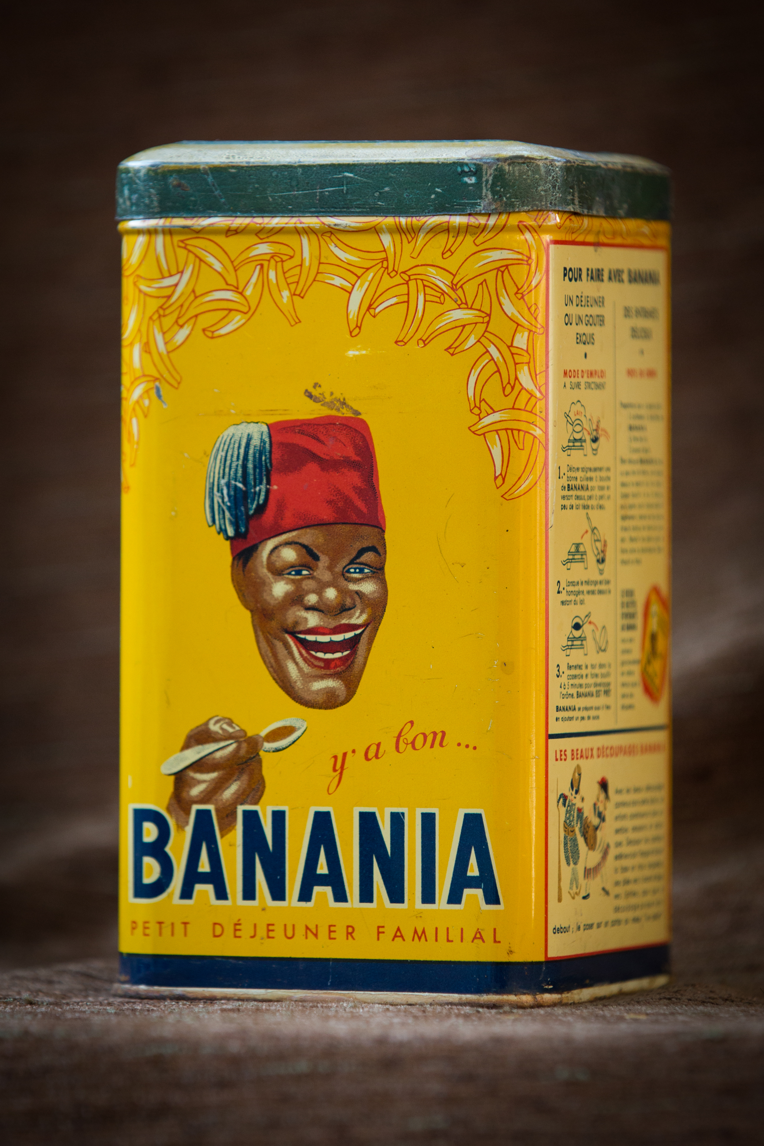 Banania boîte métallique.